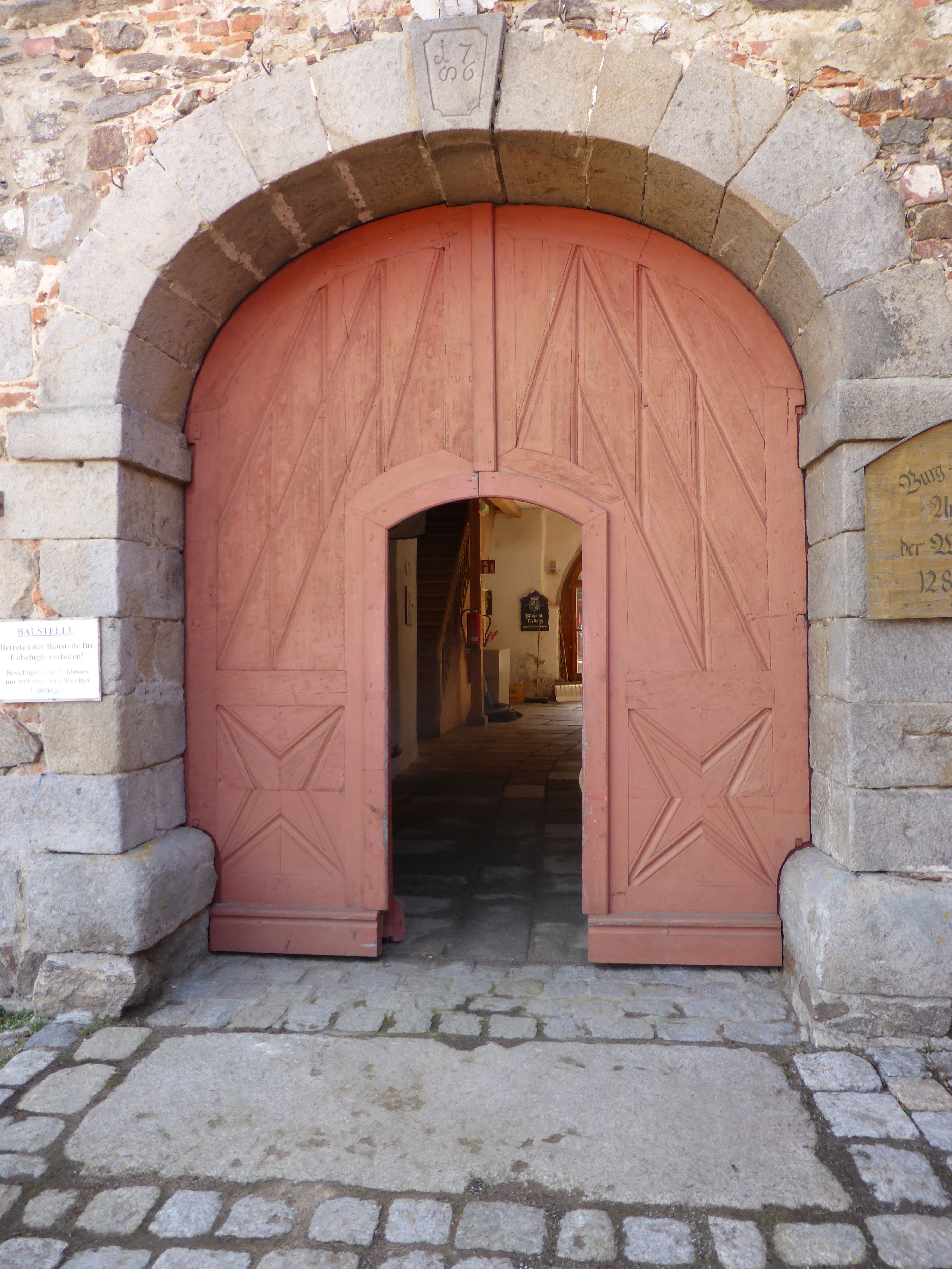 Schloss Burgtreswitz (Moosbach)